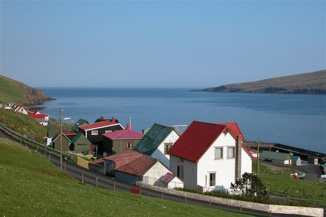 Hov, Suðuroy